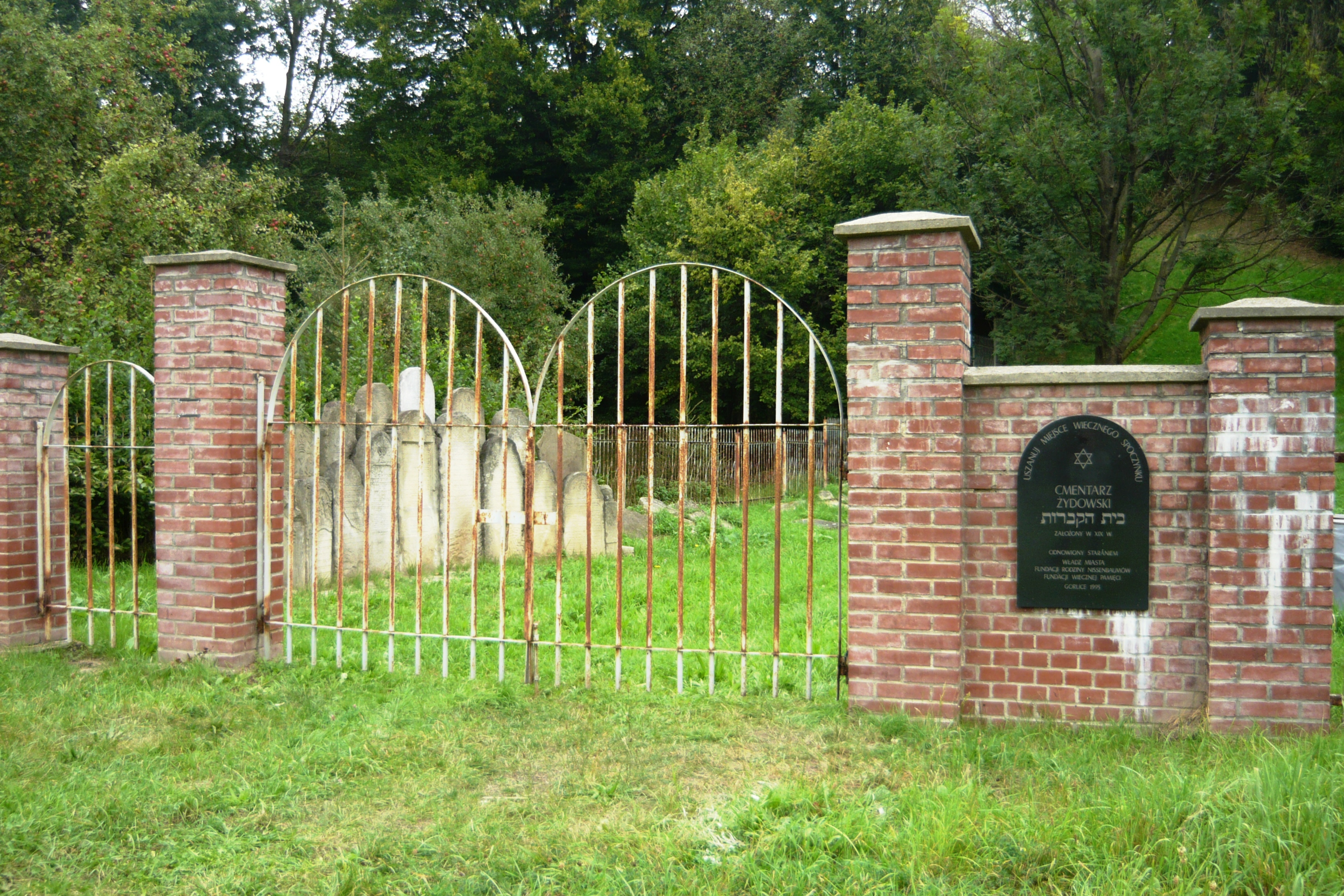 cmentarz żydowski Gorlice, Gorlice